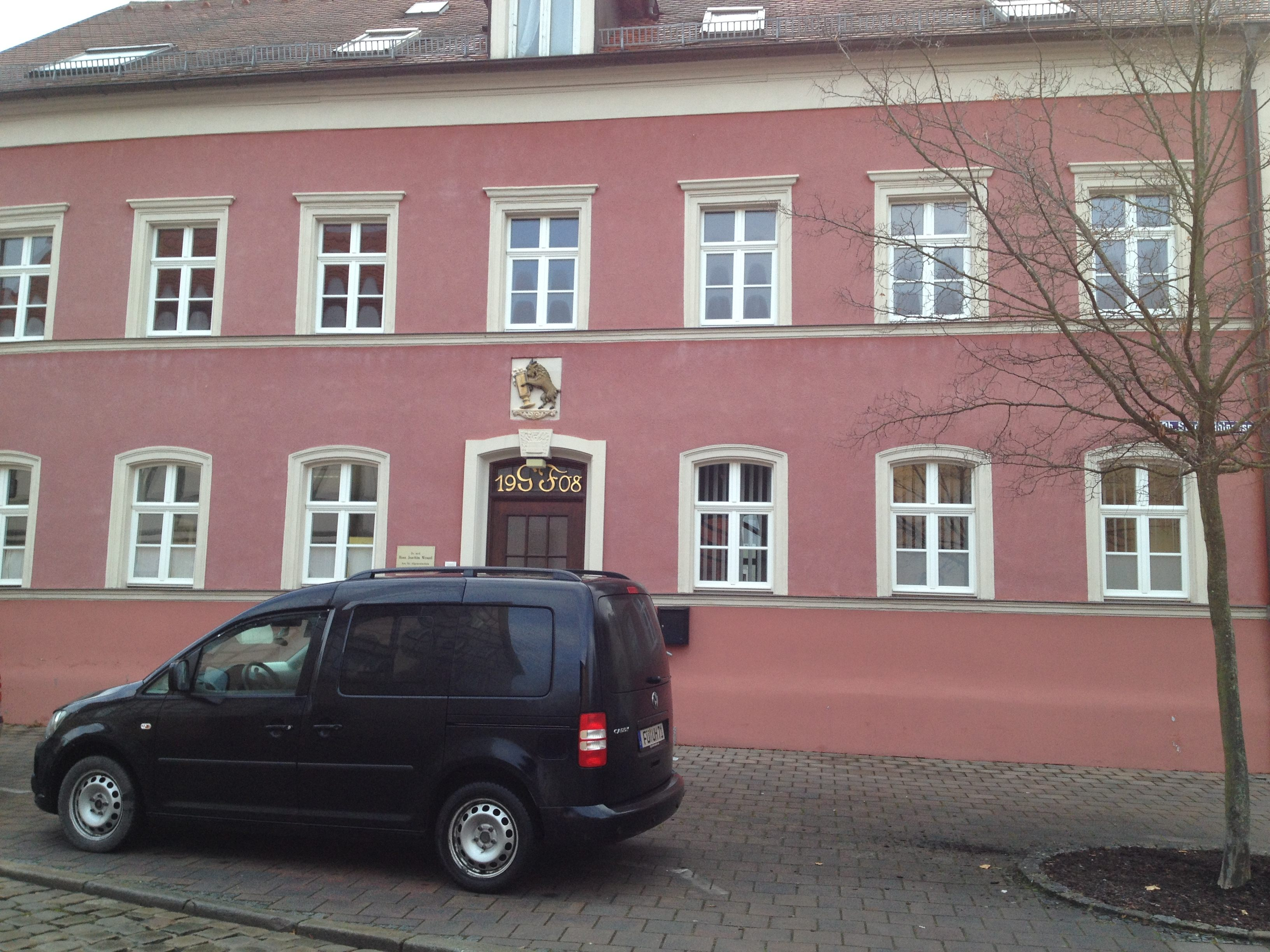 Gebäude Obere Stadtmühlgasse 7, 91781 Weißenburg, früher Brauerei Fottner